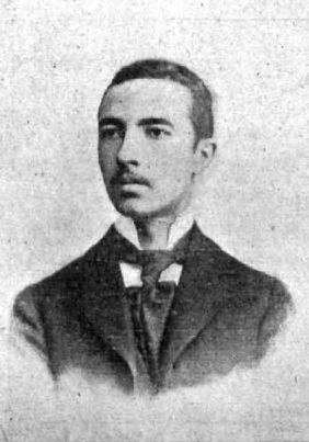 Fotografía de José Gascón y Marín (antes de cumplir los 22 años).